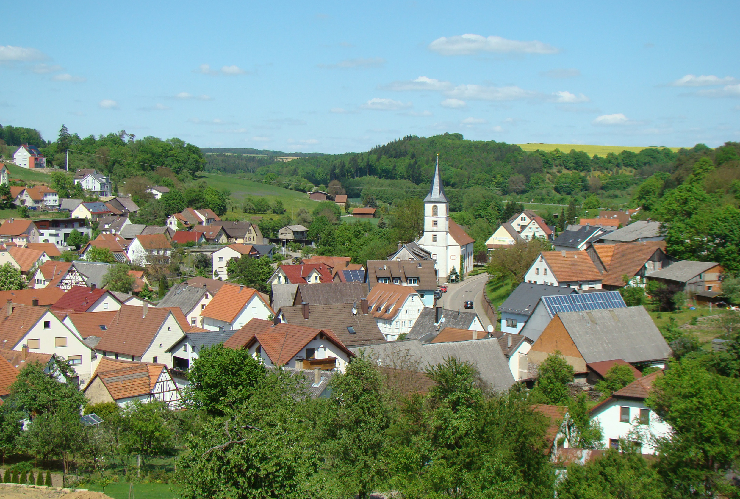 Elztal-Auerbach, Blick zur evang. Kirche